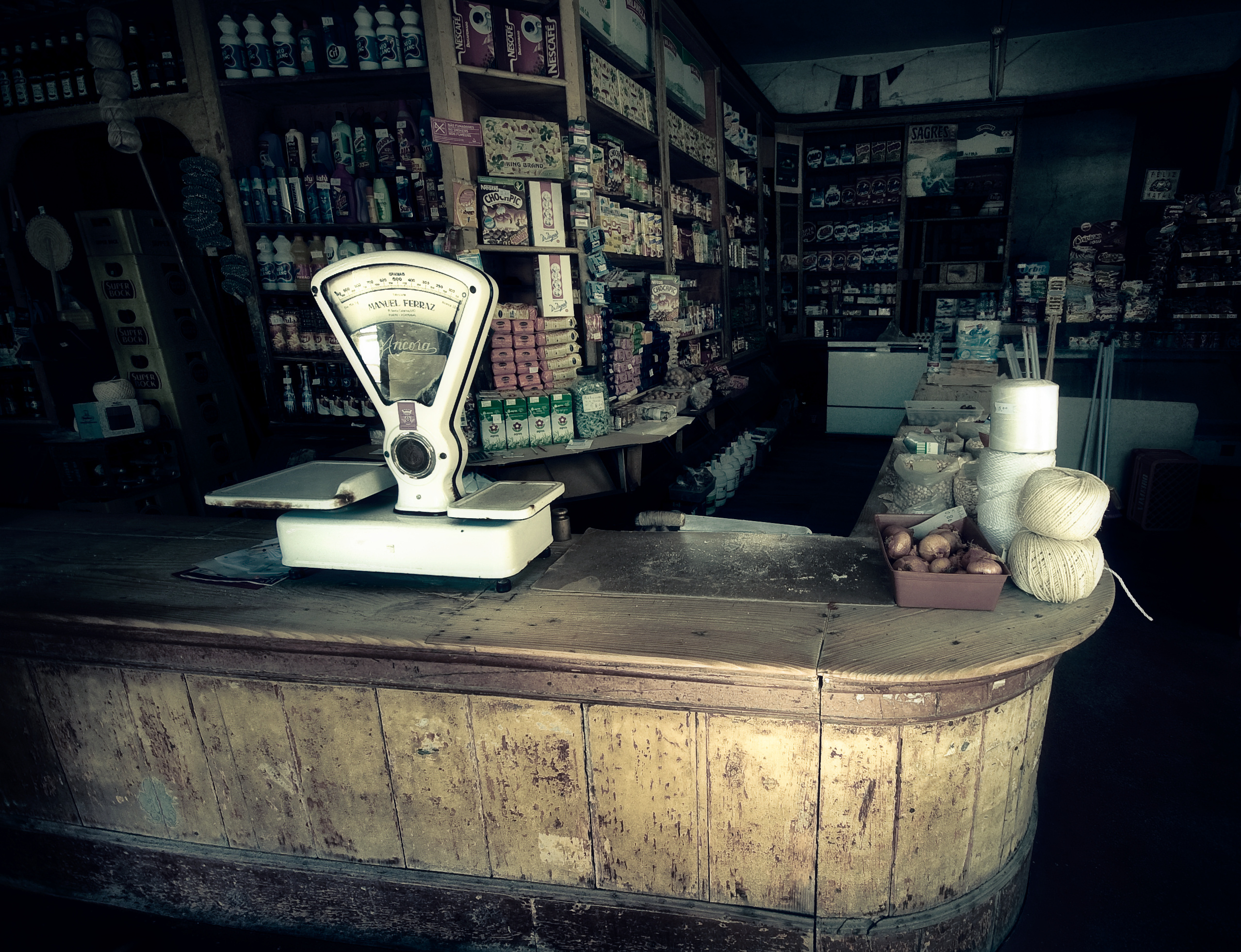 Braga, Portugal. Sigma 10-20mm; Nikon D40.